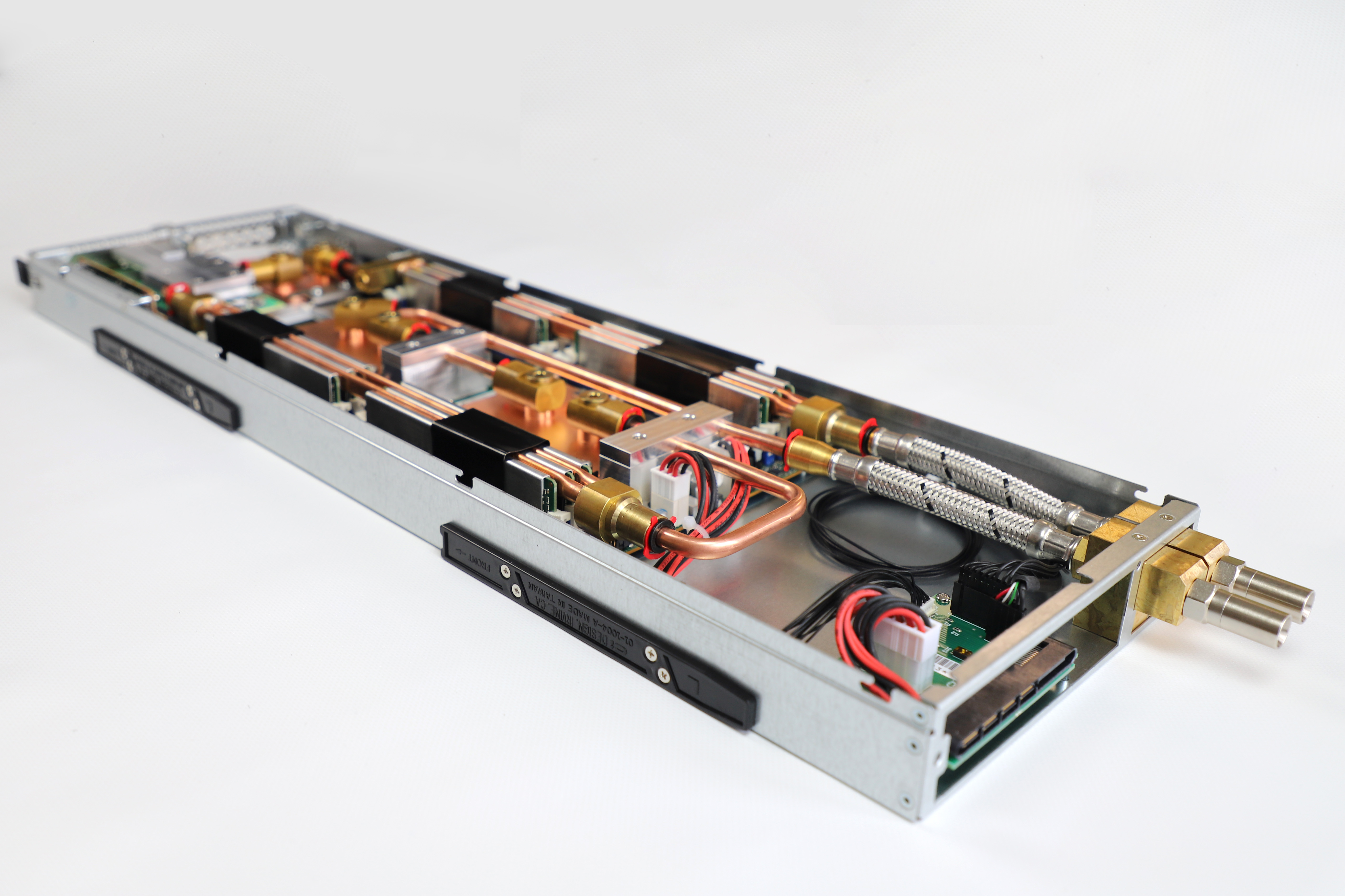 Knoteneinschub für den SlideSX-LC